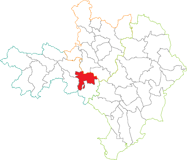 Situation du canton dans le département du Gard (France)